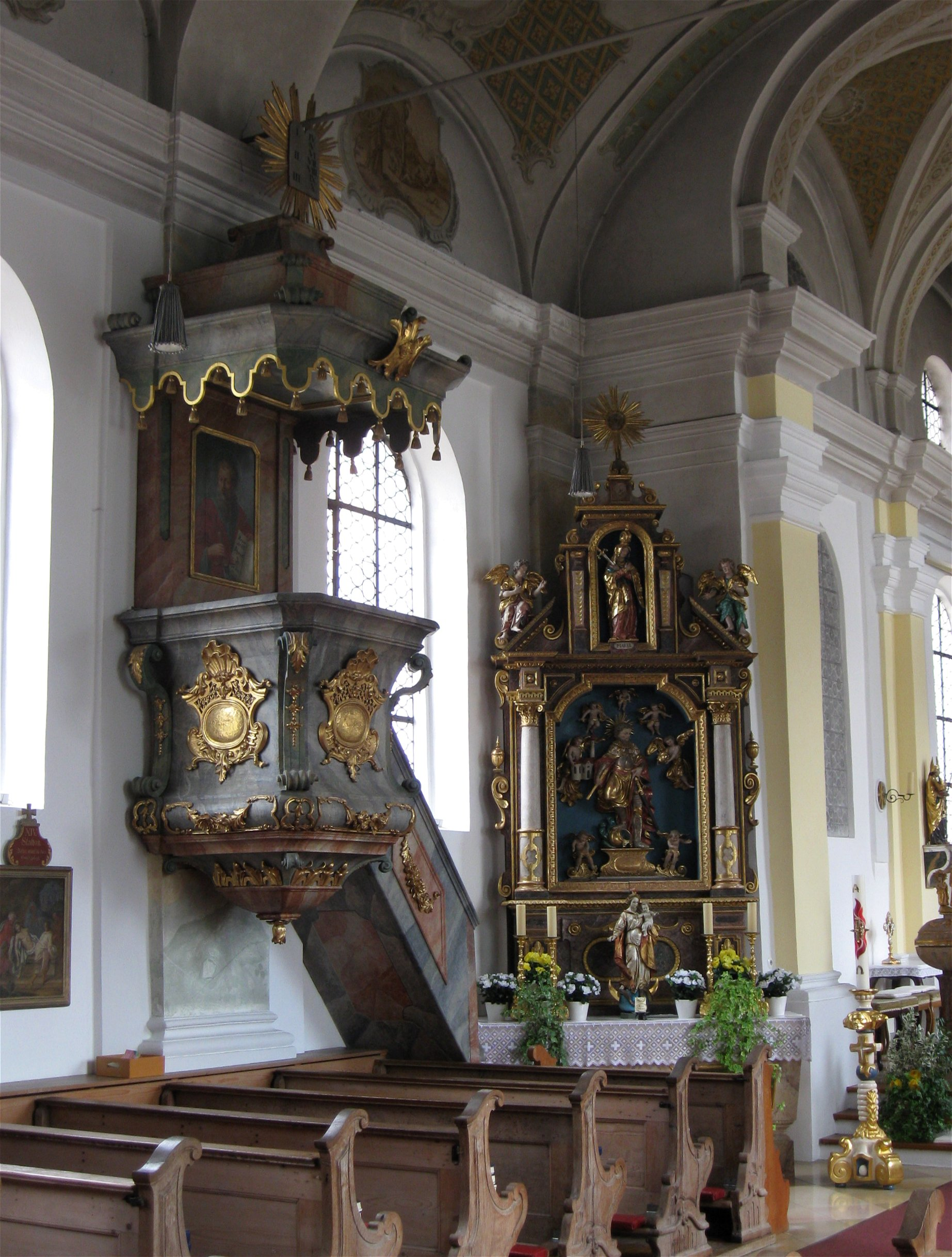 Kanzel, Katholische Pfarrkirche Hl. Kreuz, stattlicher Barockbau,1701-1723 von Johann Georg Ettenhofer erbaut; mit Ausstattung; Friedhof mit Grabdenkmälern, Ende 19./Anfang 20. Jahrhundert.